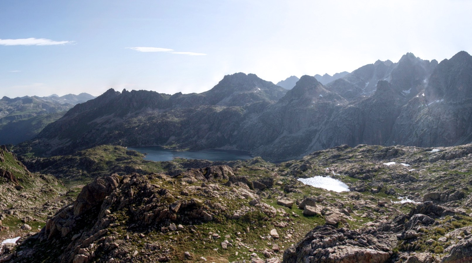 Vista del Circ de Saboredo desde un punto a medio camino entre el Port de Ratera de Colomers y el Tuc deth Pòrt Ver en Panoye